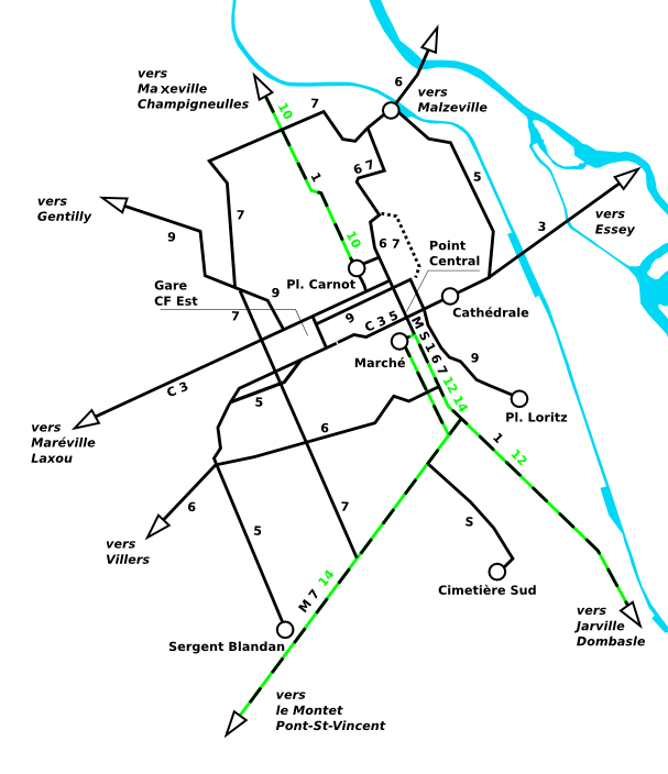 Schéma du réseau de tramway de Nancy, vers 1923, représentant les lignes urbaines (noir) et les lignes suburbaines (vert). D'après Jean Robert, Histoire des transports dans les villes de France, ed. Jean Robert, 1974.